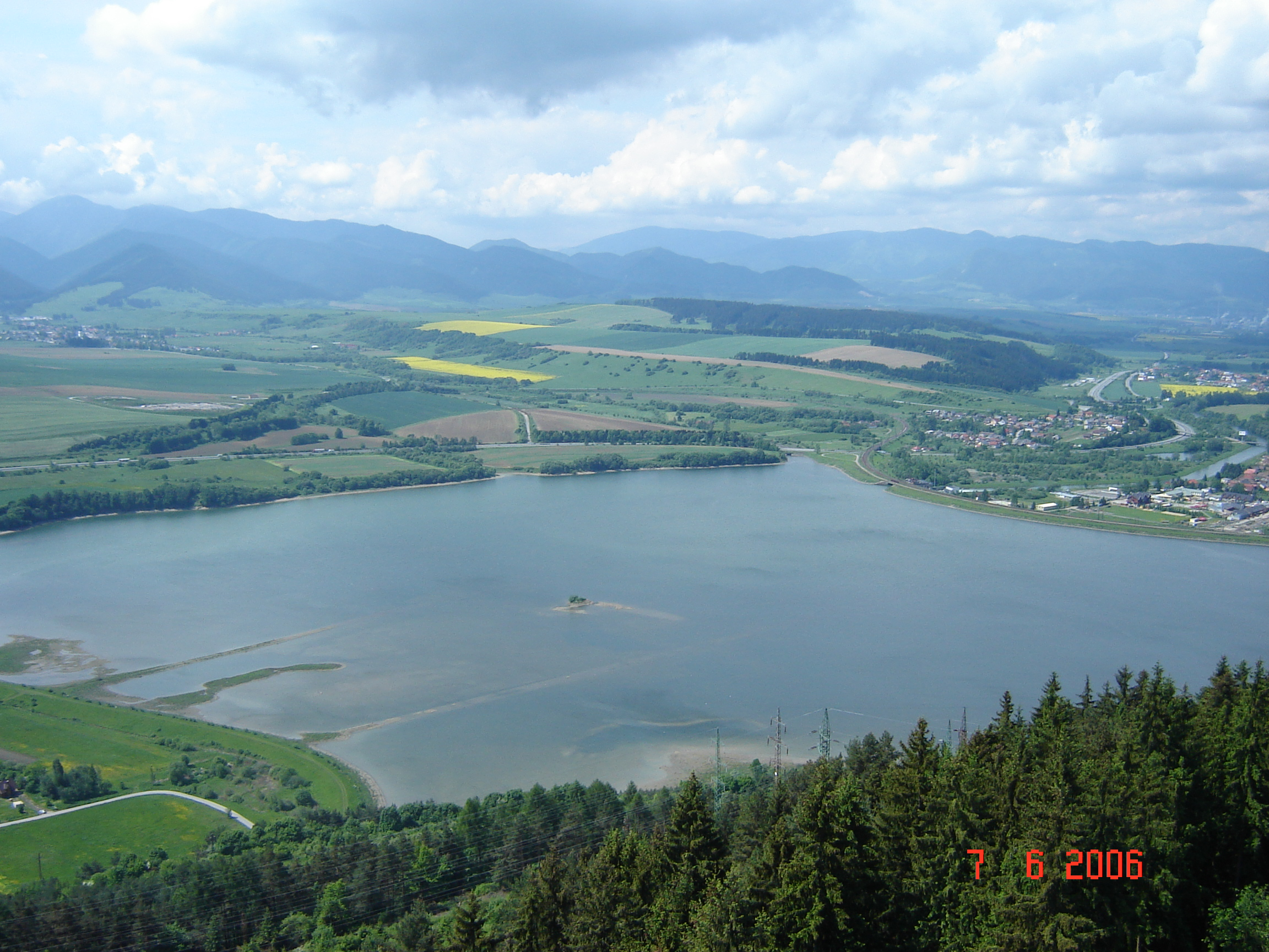 VN Bešeňová